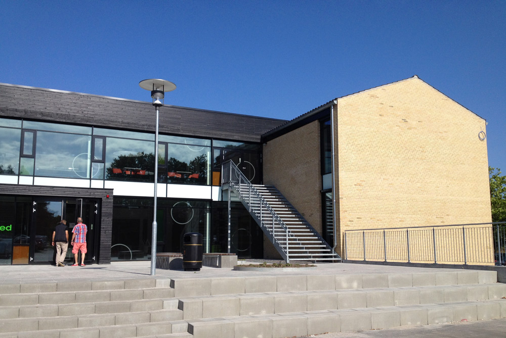 Lyngby Gymnasiums nye hovedindgang